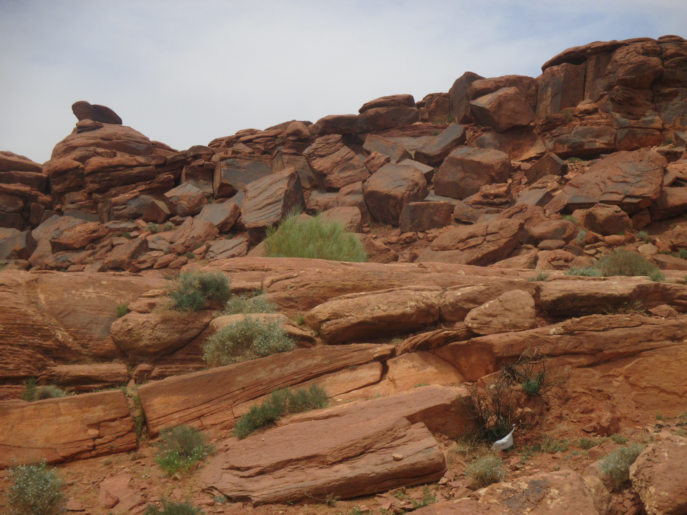 N47, Tiout, Algérie